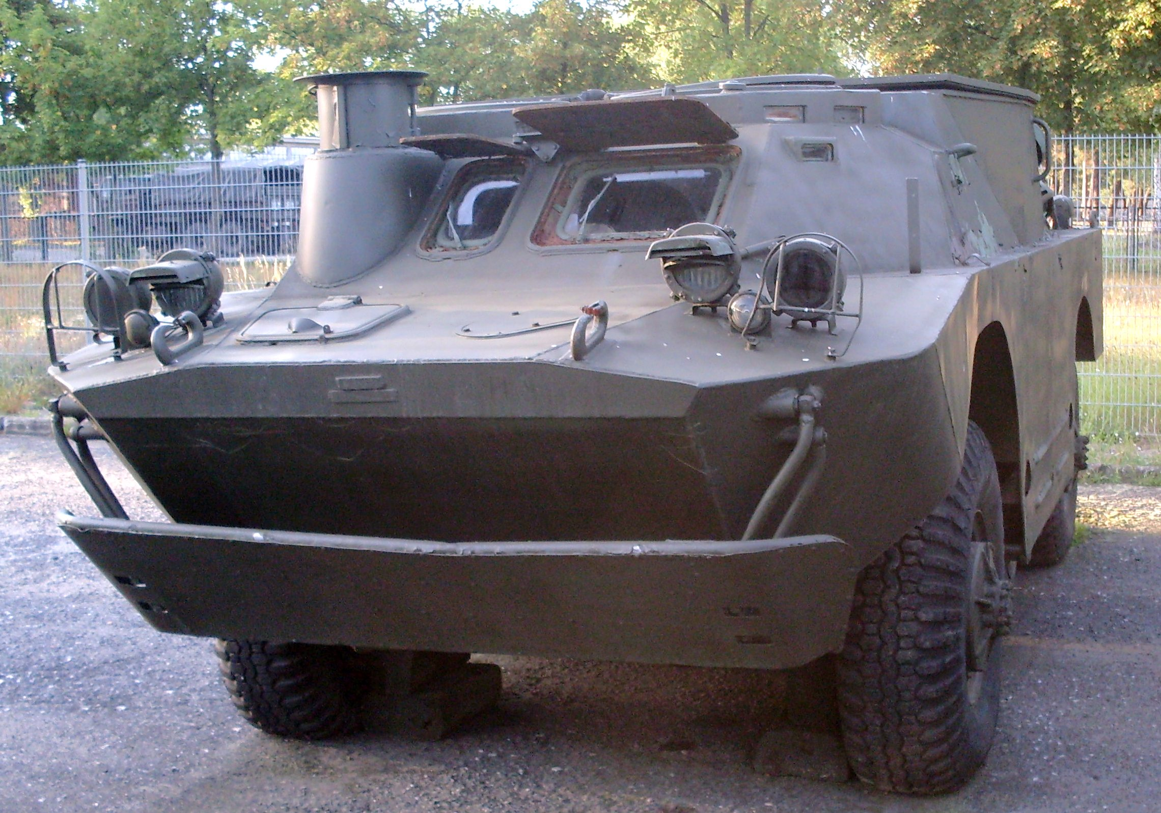 BRDM wersja przeciwpancerna